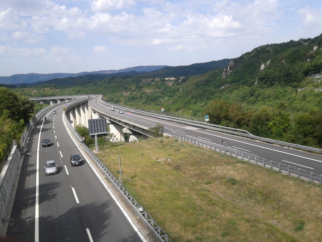 Il viadotto di Pietrasecca sull'autostrada A24 Roma-Pescara